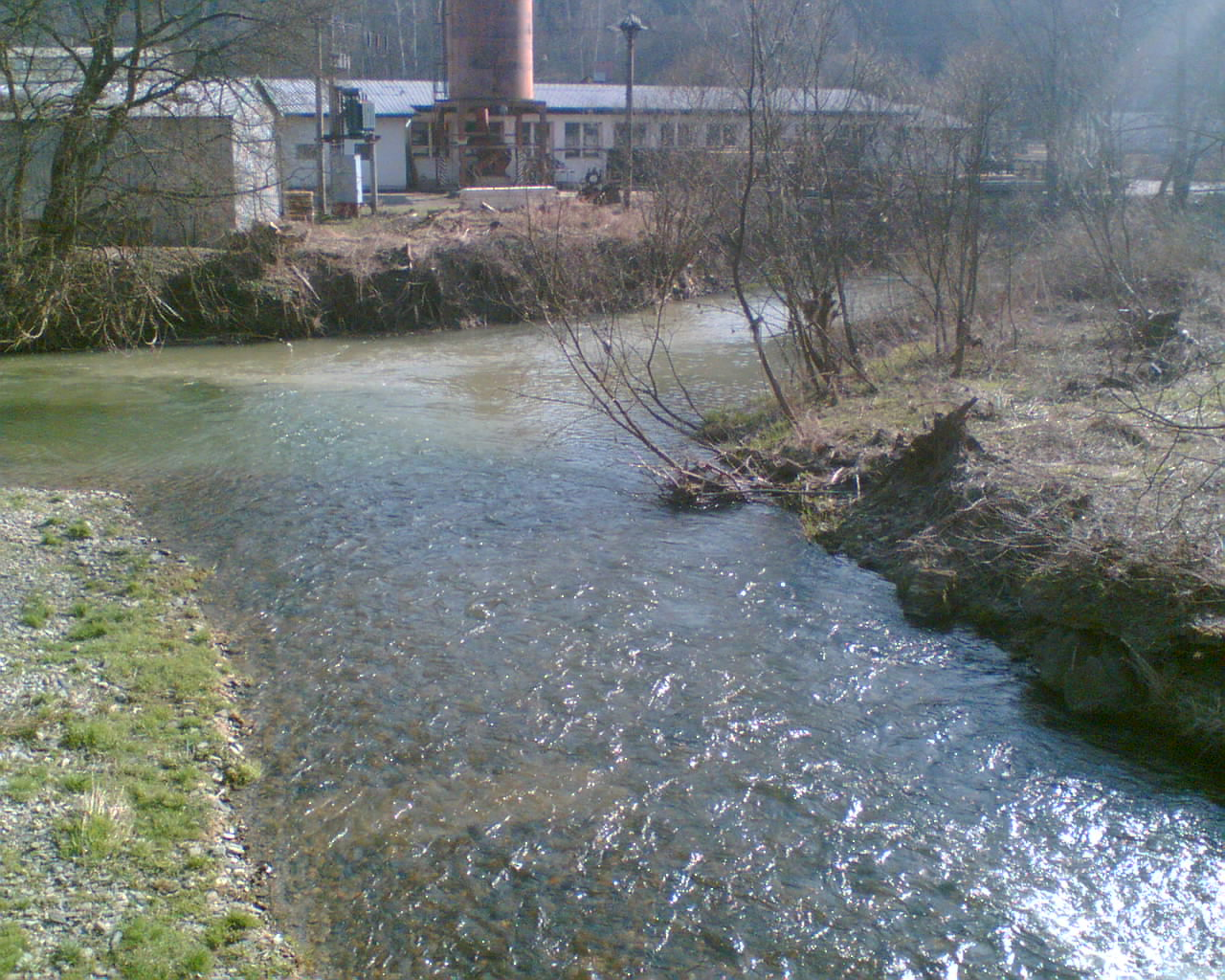 Česky: Ústí Březné do Moravské Sázavy